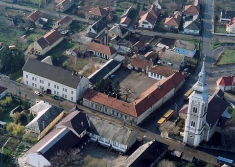 Mezőcsát, Hungary, aerialphotography